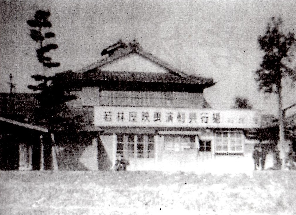 愛知県碧海郡高岡町（現・豊田市若林東町）にあった映画館「若林座」。